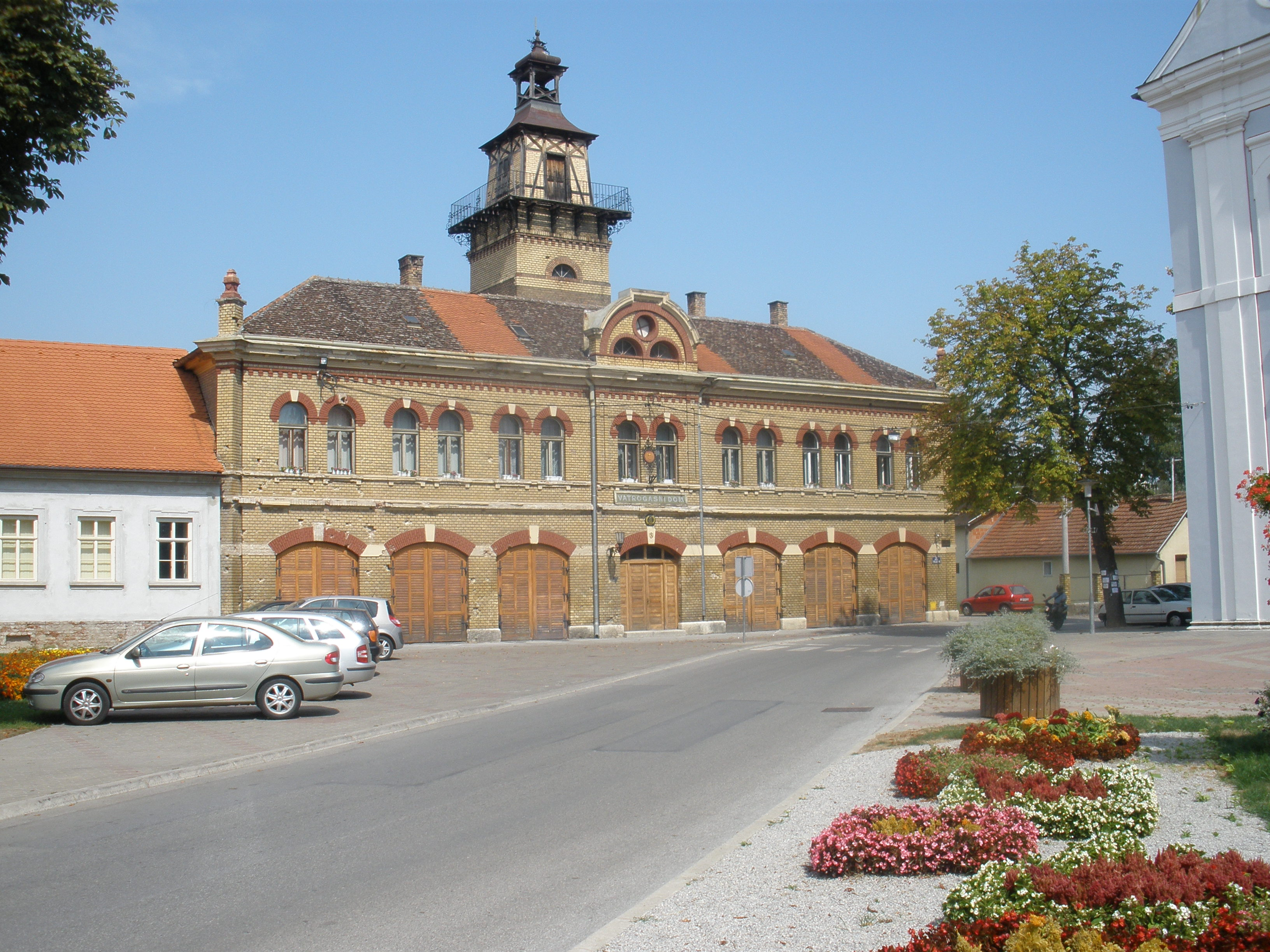 Vatrogasni dom u Slavonskome Brodu.